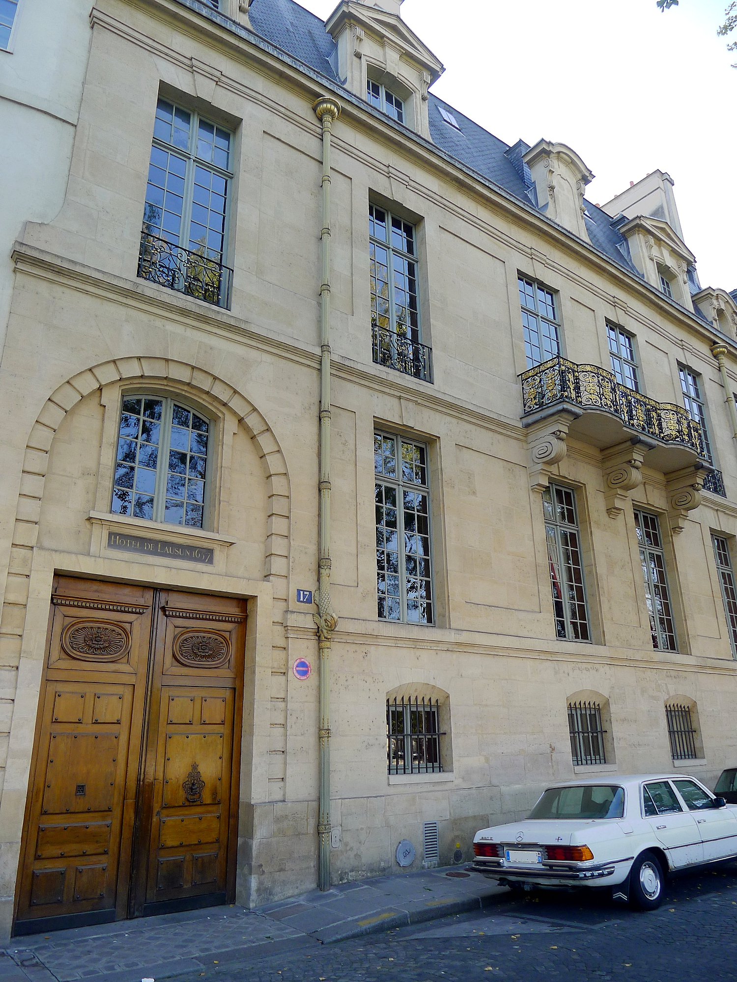 Hôtel de Lauzun (17, quai d'Anjou - Paris IV)